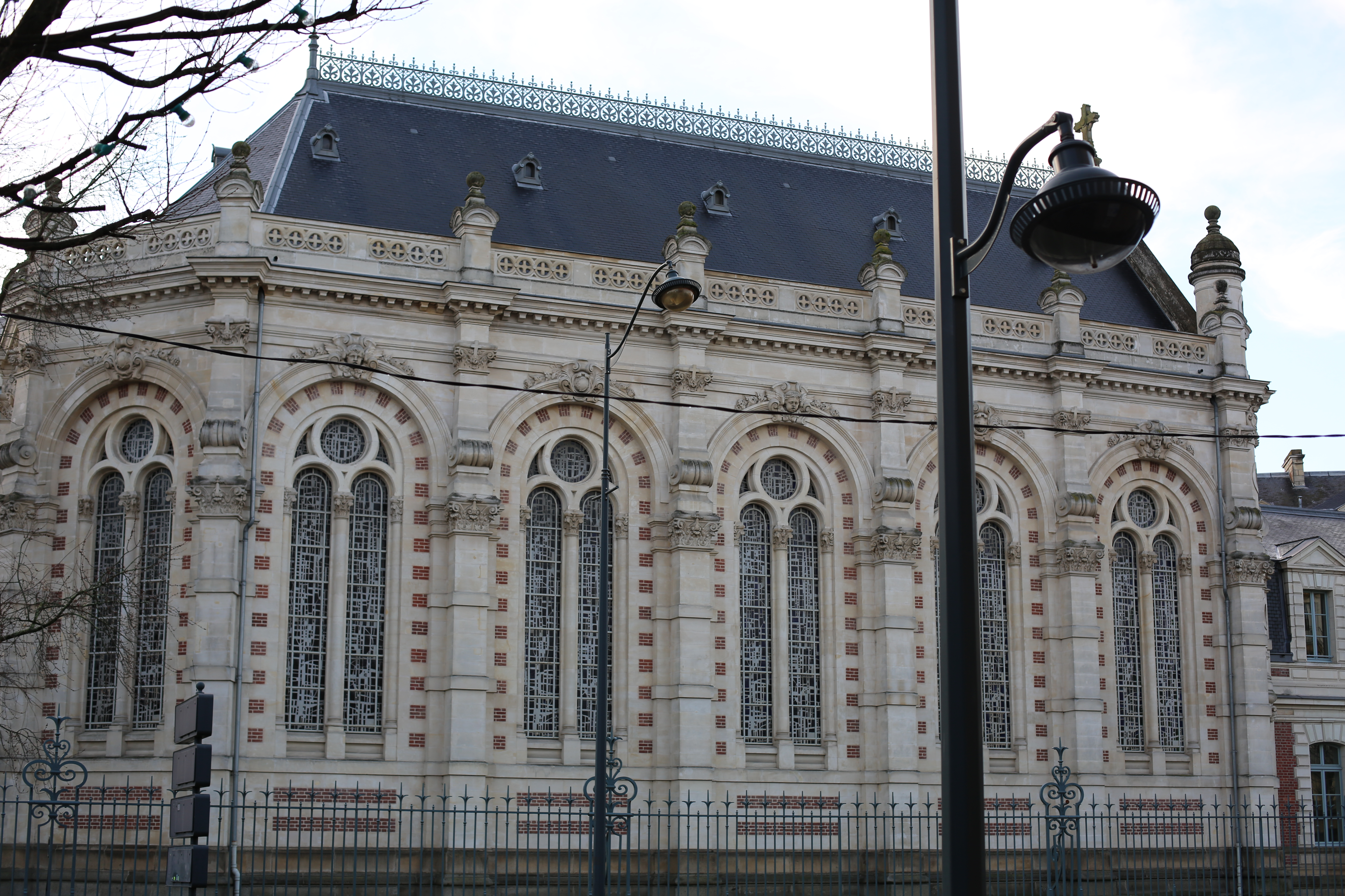 Lycée Émile-Zola de Rennes